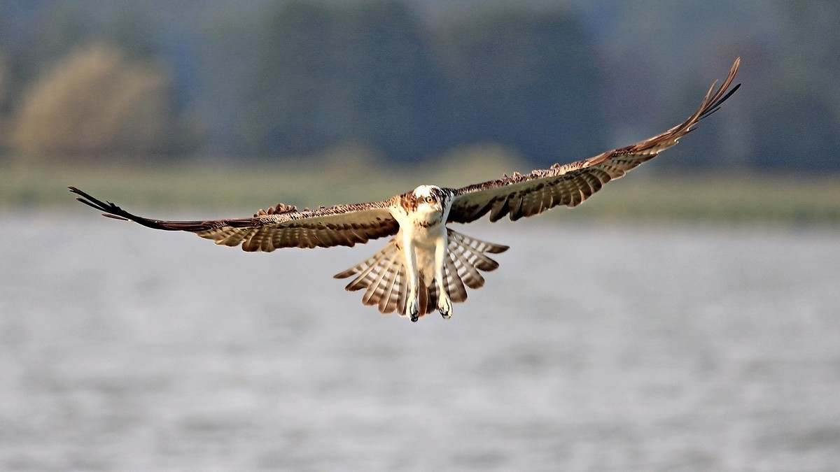 Anfliegender Fischadler in Mecklenburg